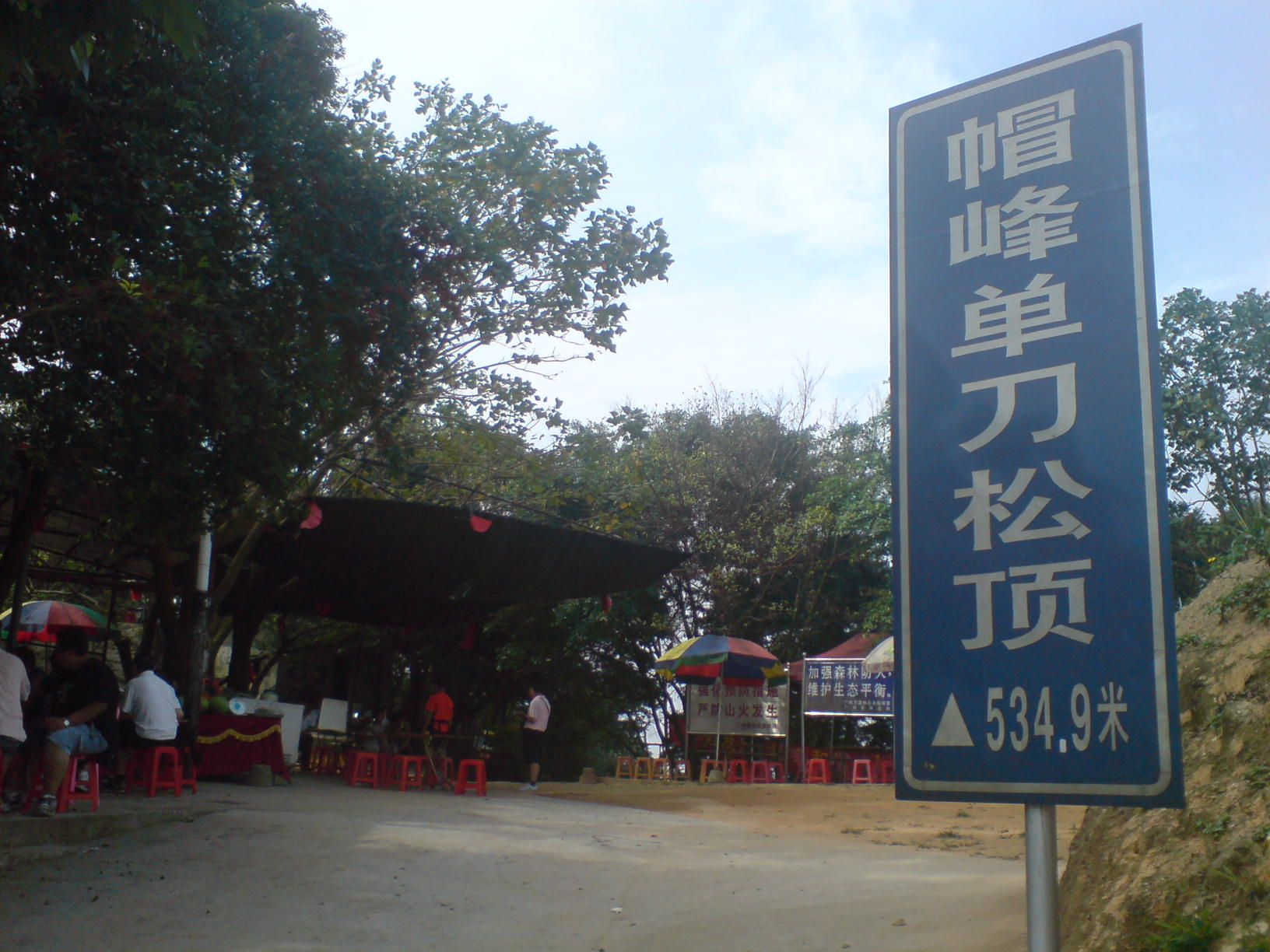 广州白云区的帽峰山山顶